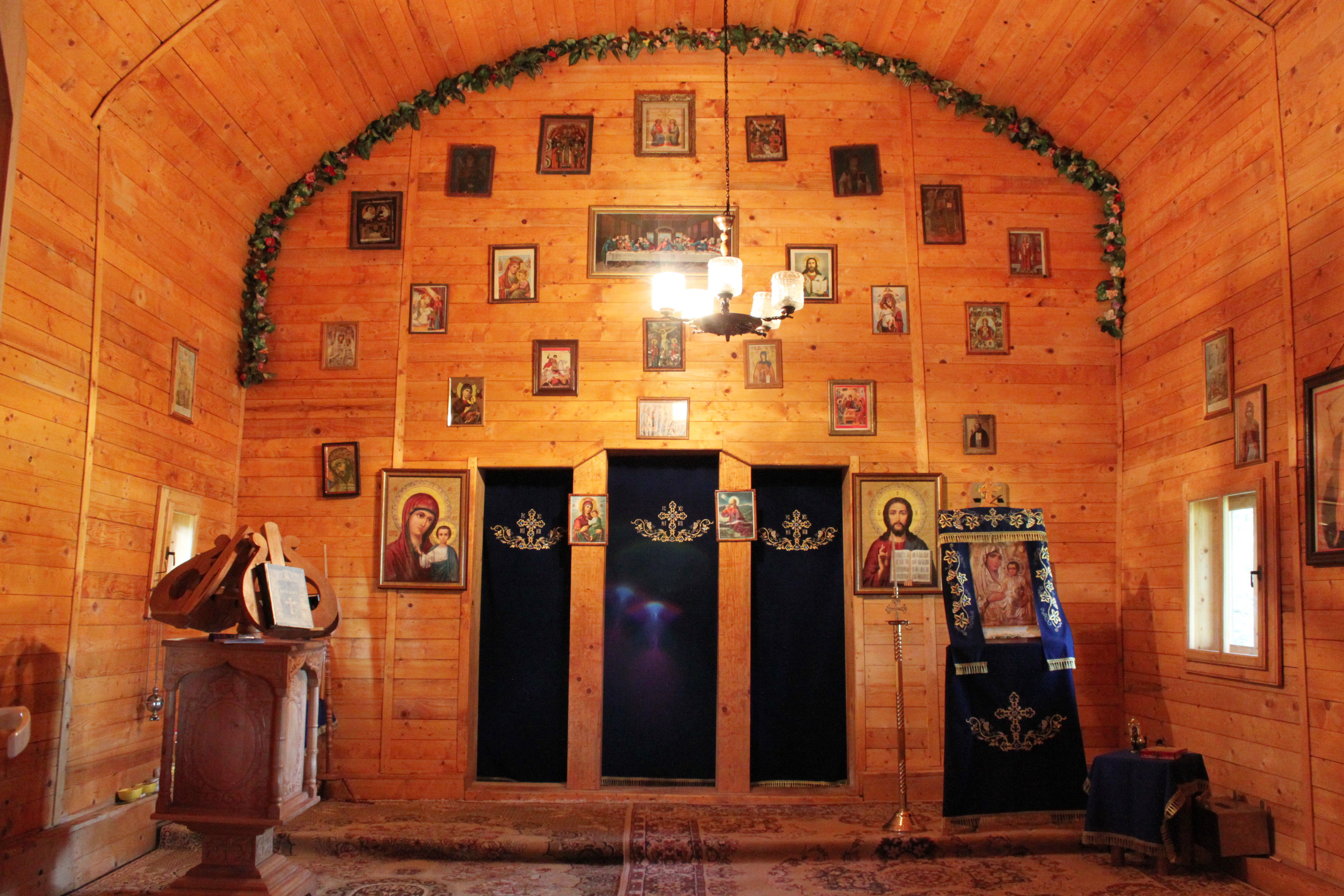 biserica de lemn din Subpiatră, judeţul Bihor.